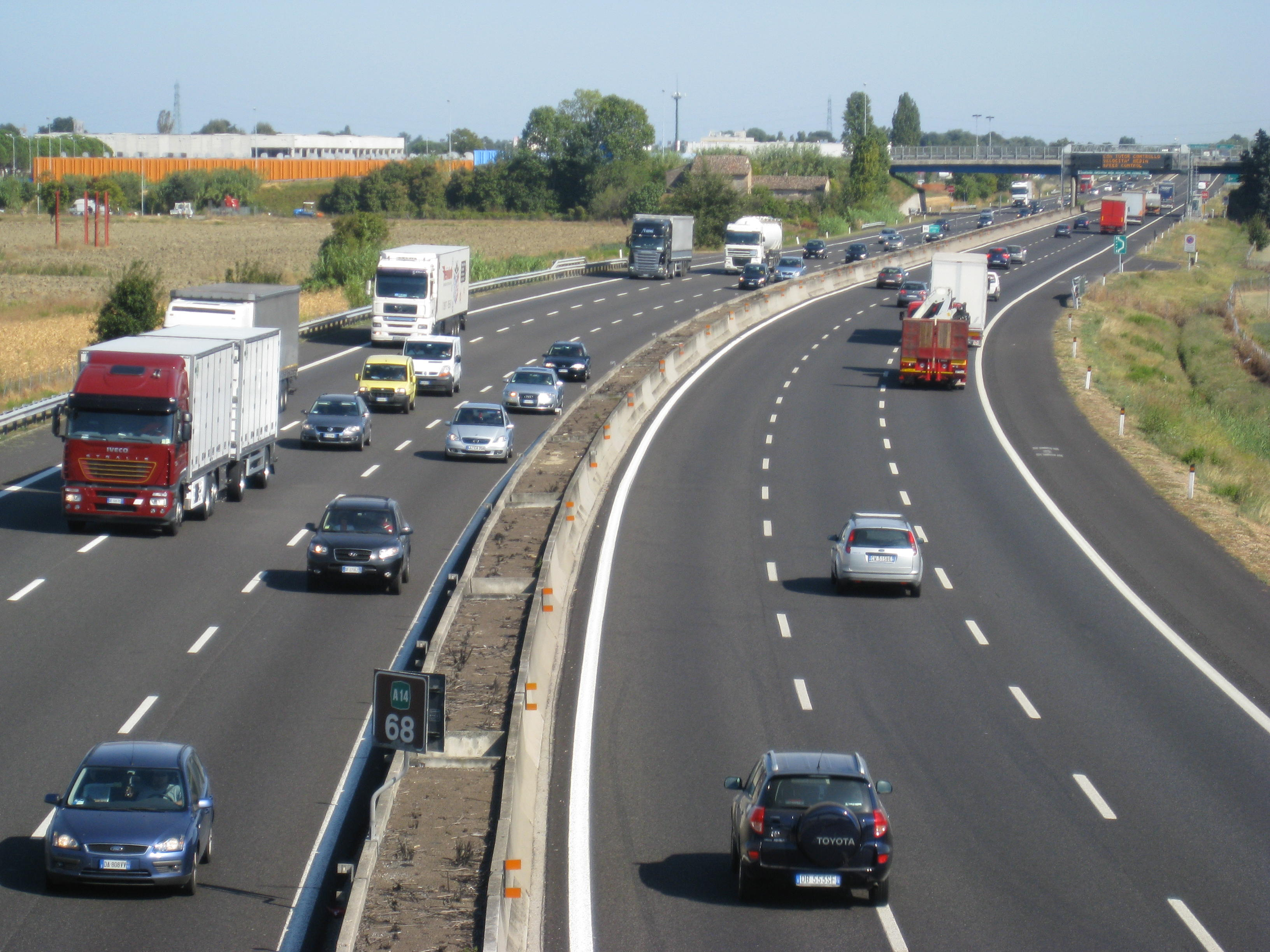 Perkele, autostrada A14 nei pressi del casello di Forlì